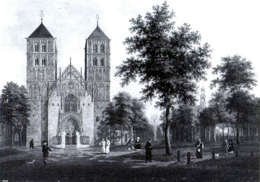 Der St.-Paulus-Dom in Münster (Westfalen). Westfassade mit Domplatz 1784.